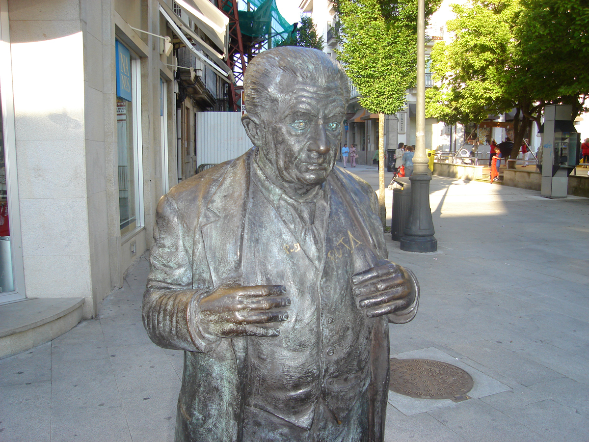 Ánxel Fole, Lugo, Galiza